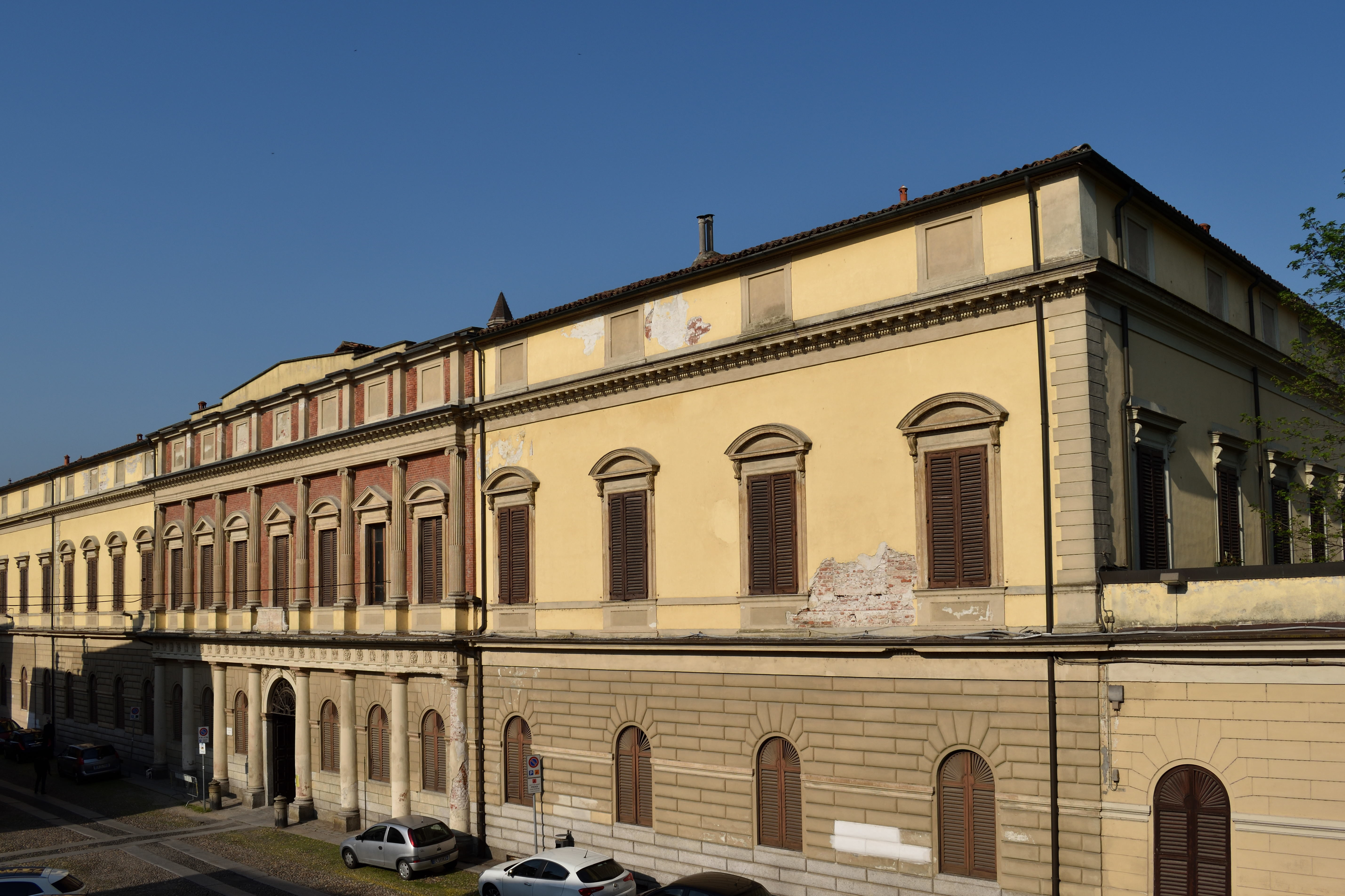 Facciata del Palazzo Botta Adorno di Pavia, P.zza Botta Adorno 10, Museo di storia naturale dell'Università di Pavia.